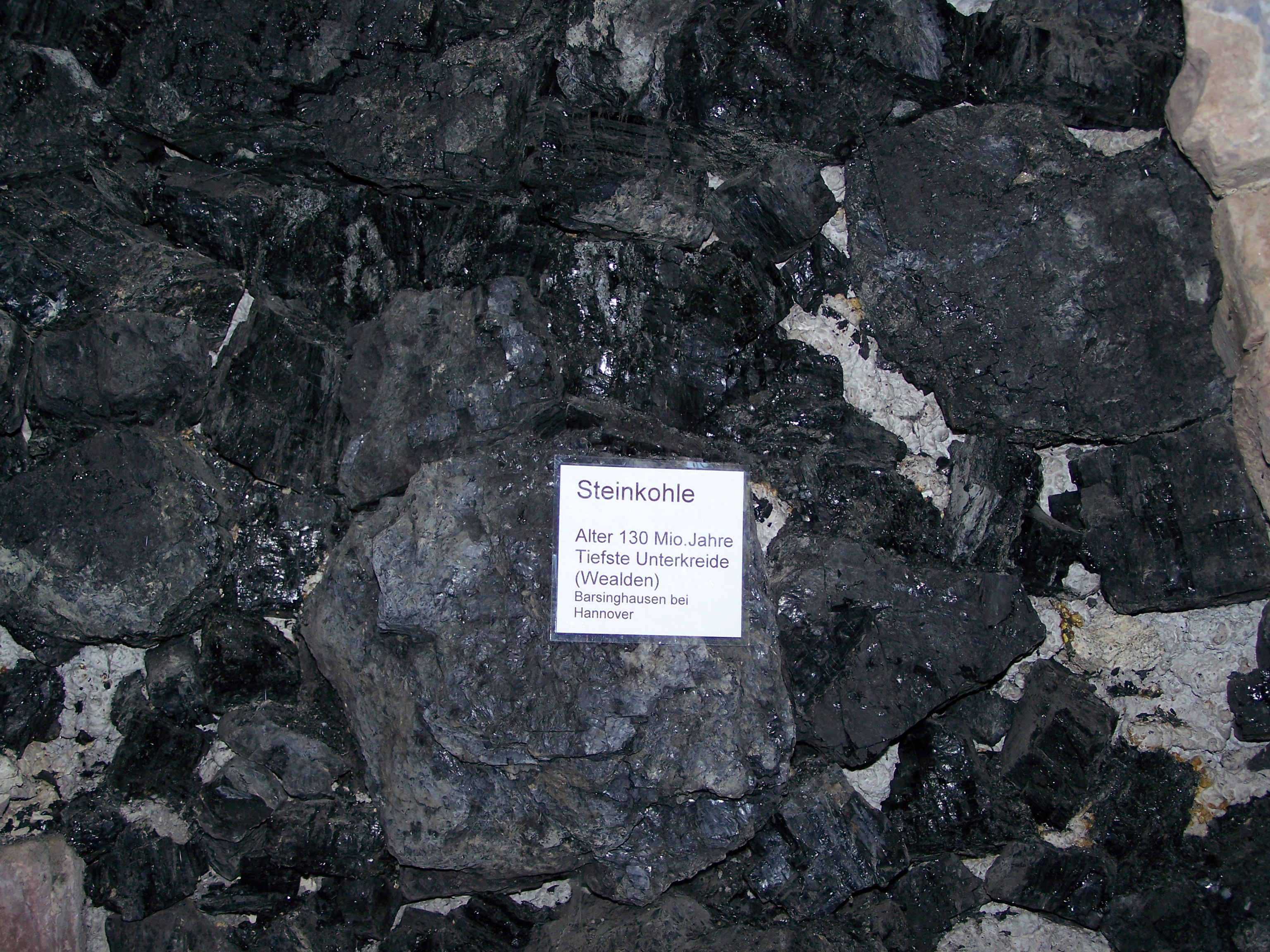 Wealdenkohle im Bergbaumuseum Grube Lautenthals Glück